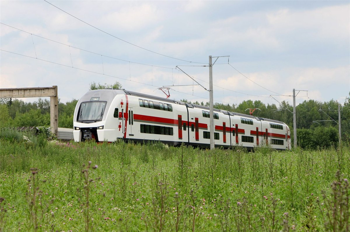 4-członowa jednostka Stadler KISS Kolei Gruzińskich